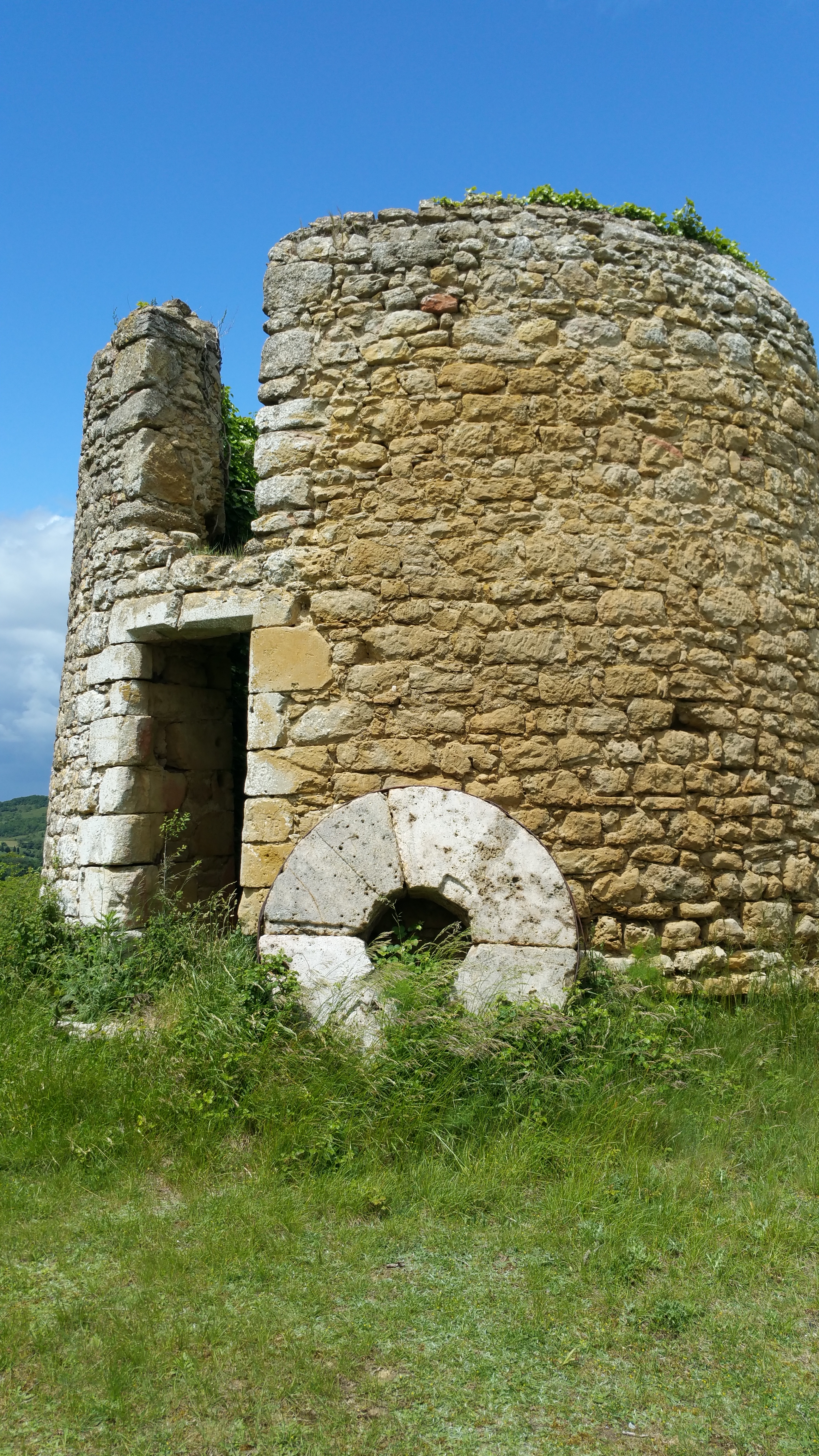 Ruine du moulin de Plavilla